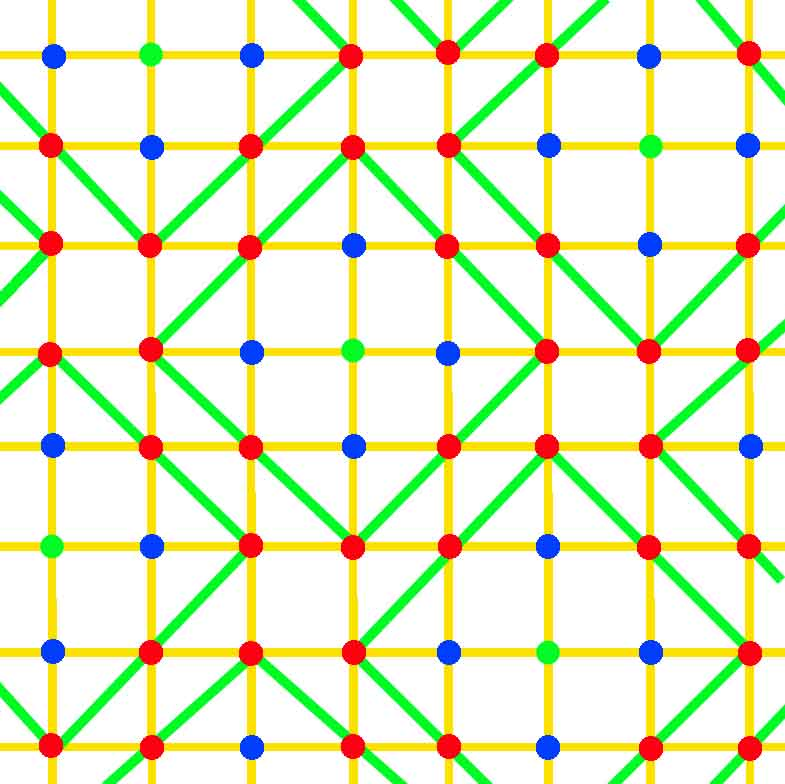 Figure illustrant le principe de la redondance dans un code correcteur parfait